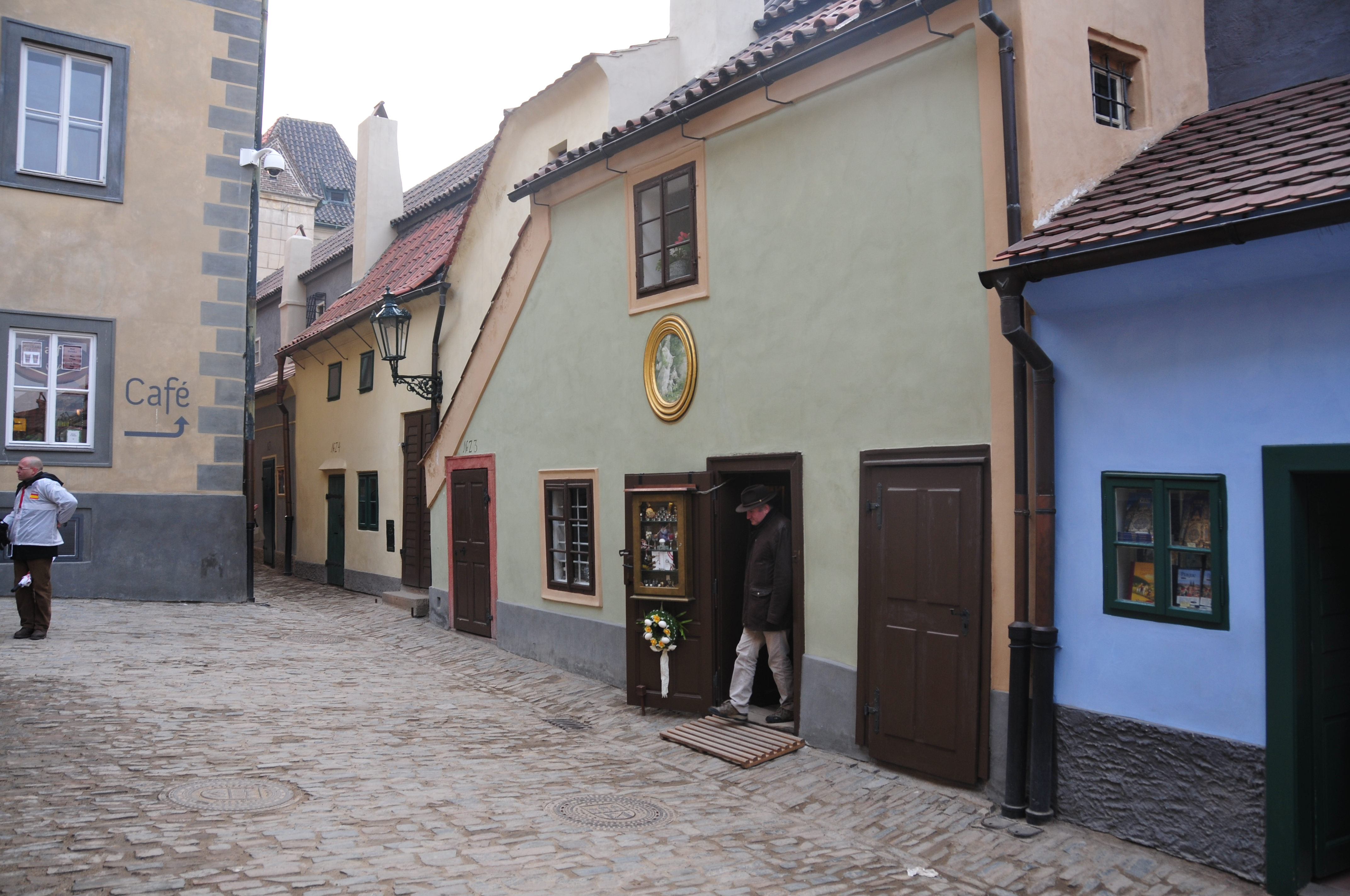 Prag